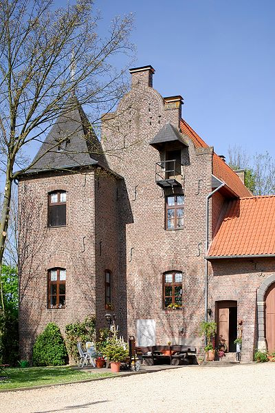 Haus Paland